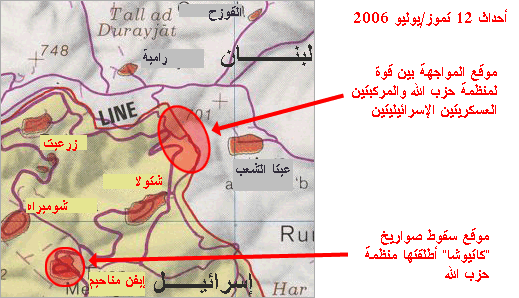 خريطة مواقع المواجهة بين منظمة حزب الله والجيش الإسرائيلي في 12 تموز/يوليو 2006.